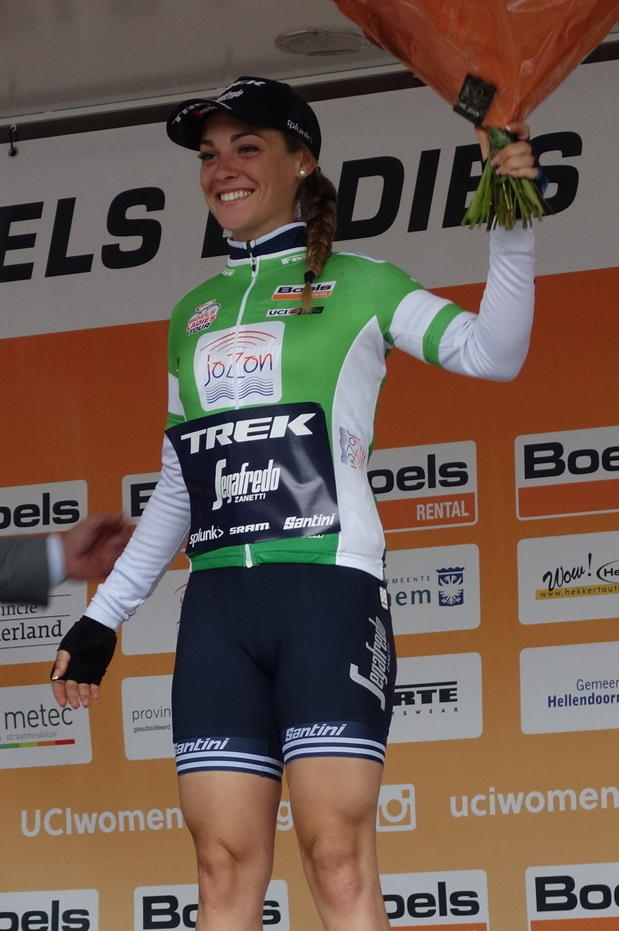 Letizia Paternoster kreeg de groene puntentrui na de eerste etappe in Weert in de Boels Ladies Tour 2019